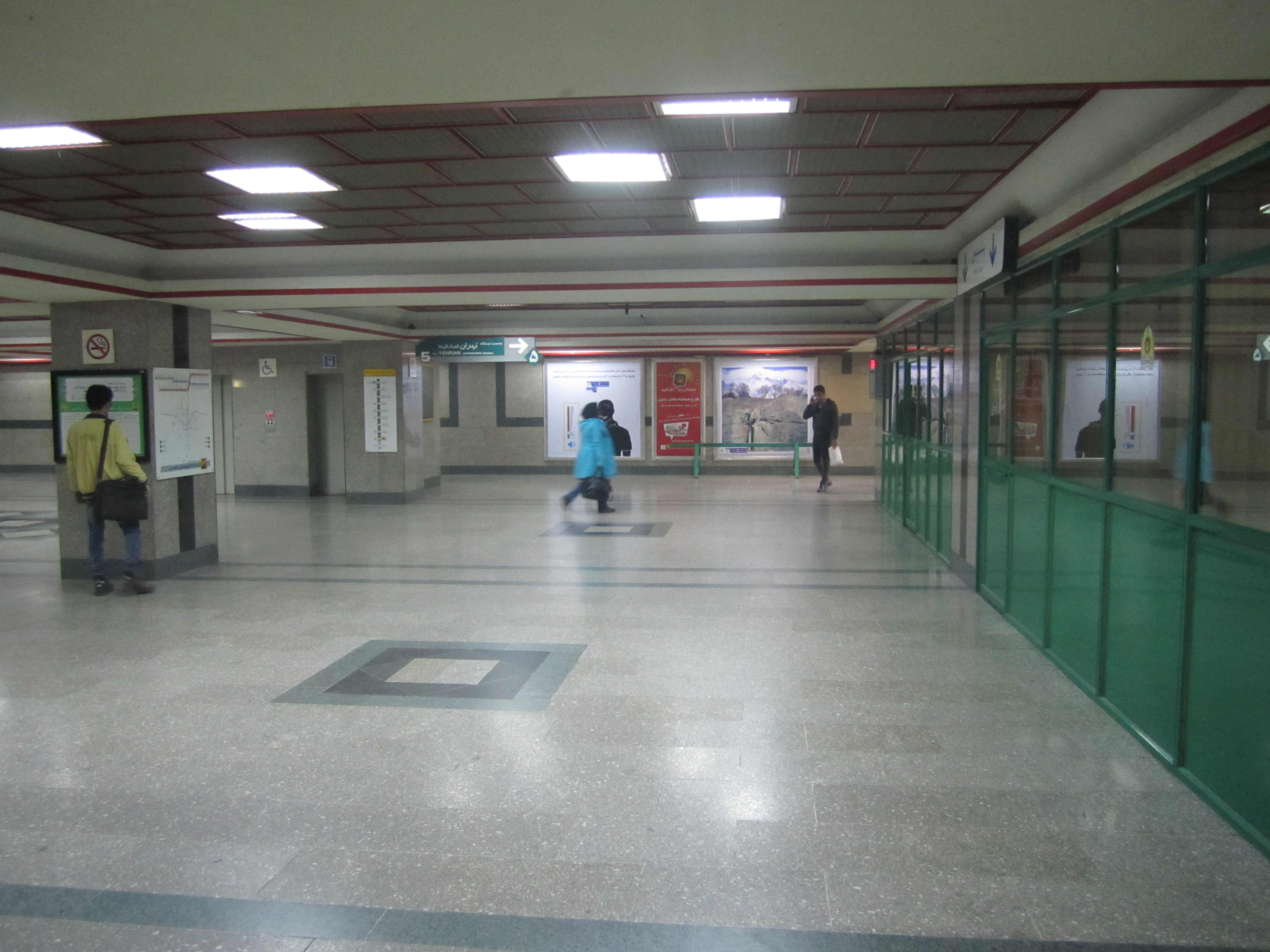 سالن ایستگاه متروی کرج